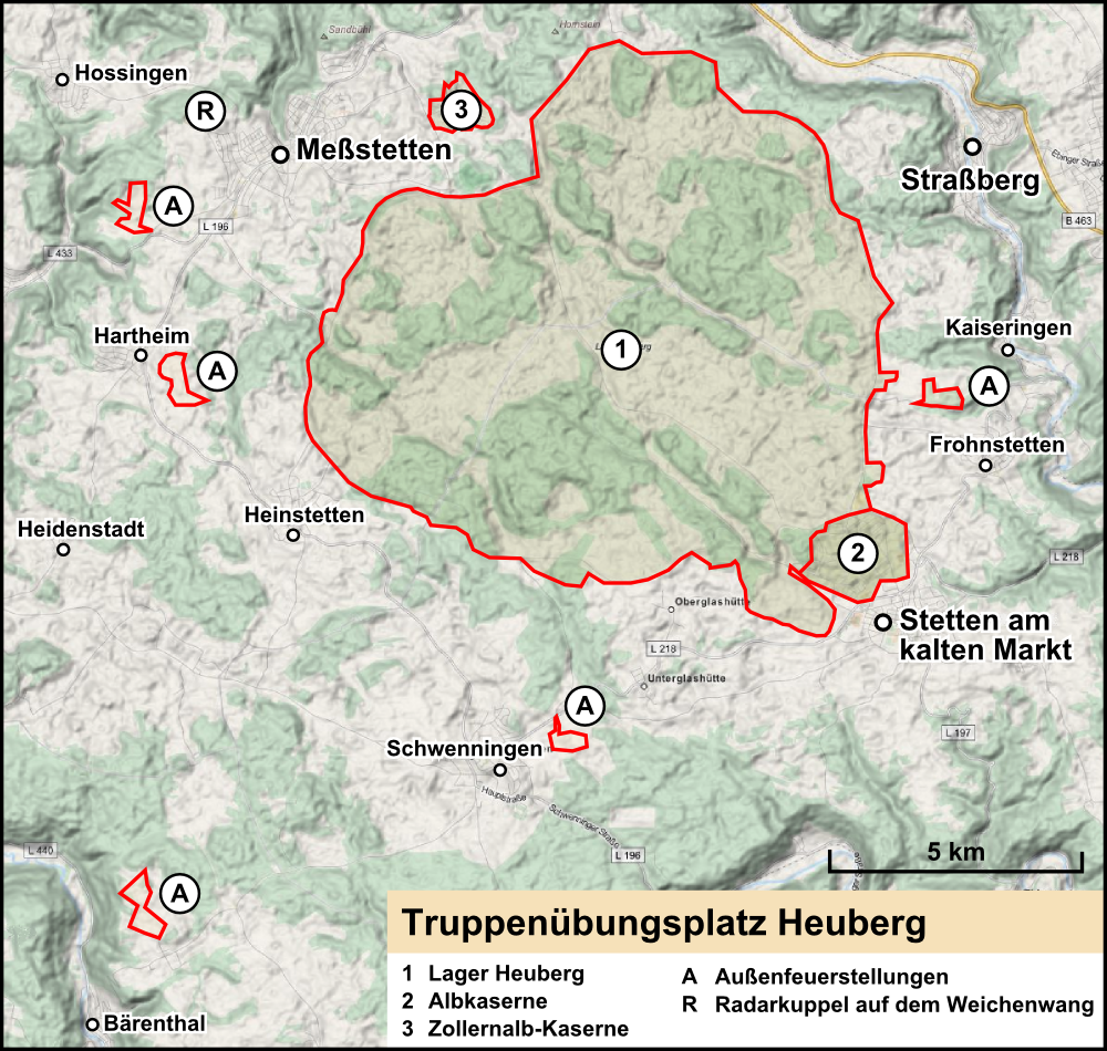 Der Truppenübungsplatz Heuberg in Baden-Württemberg.